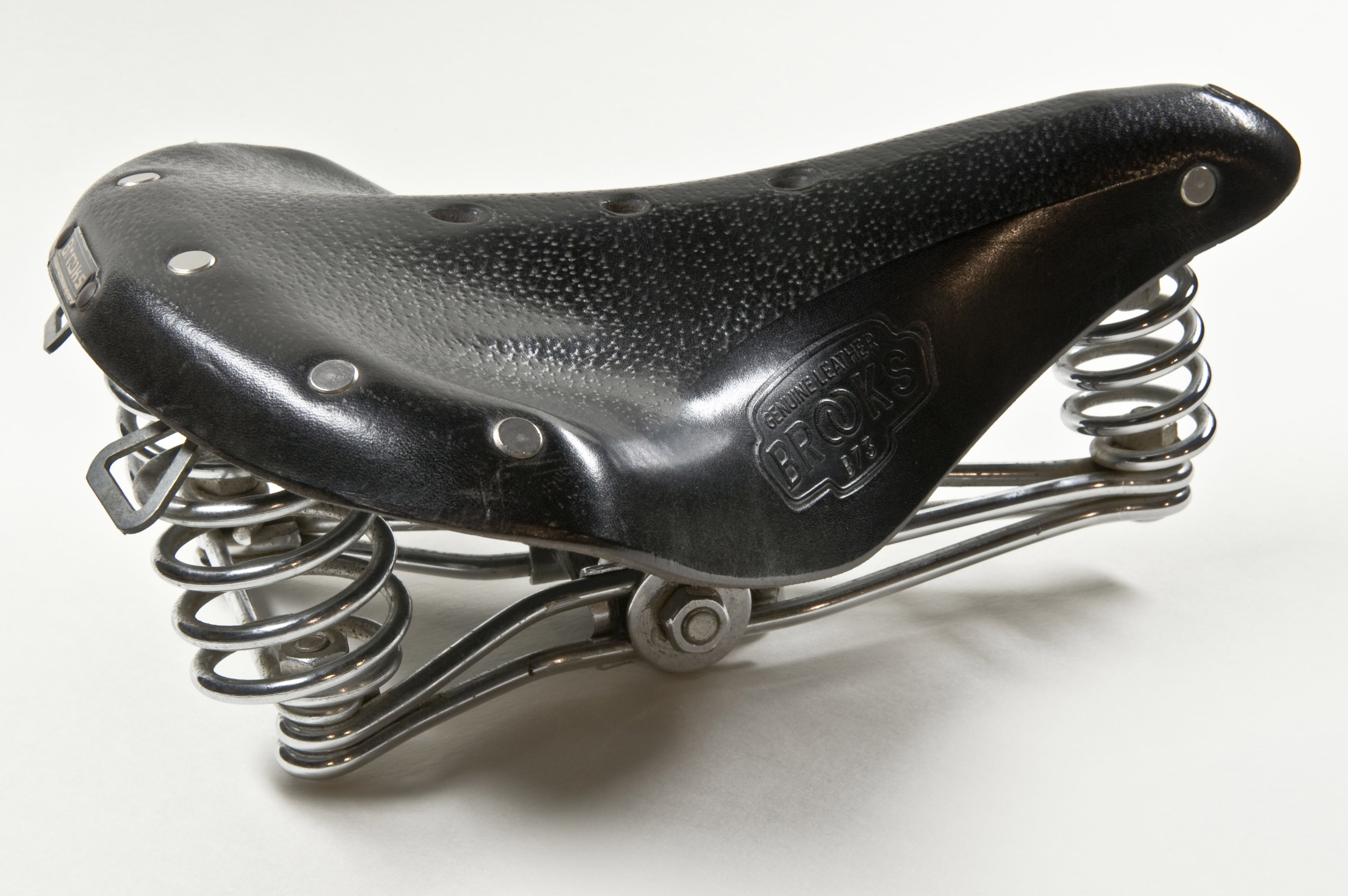 Brooks saddle B73